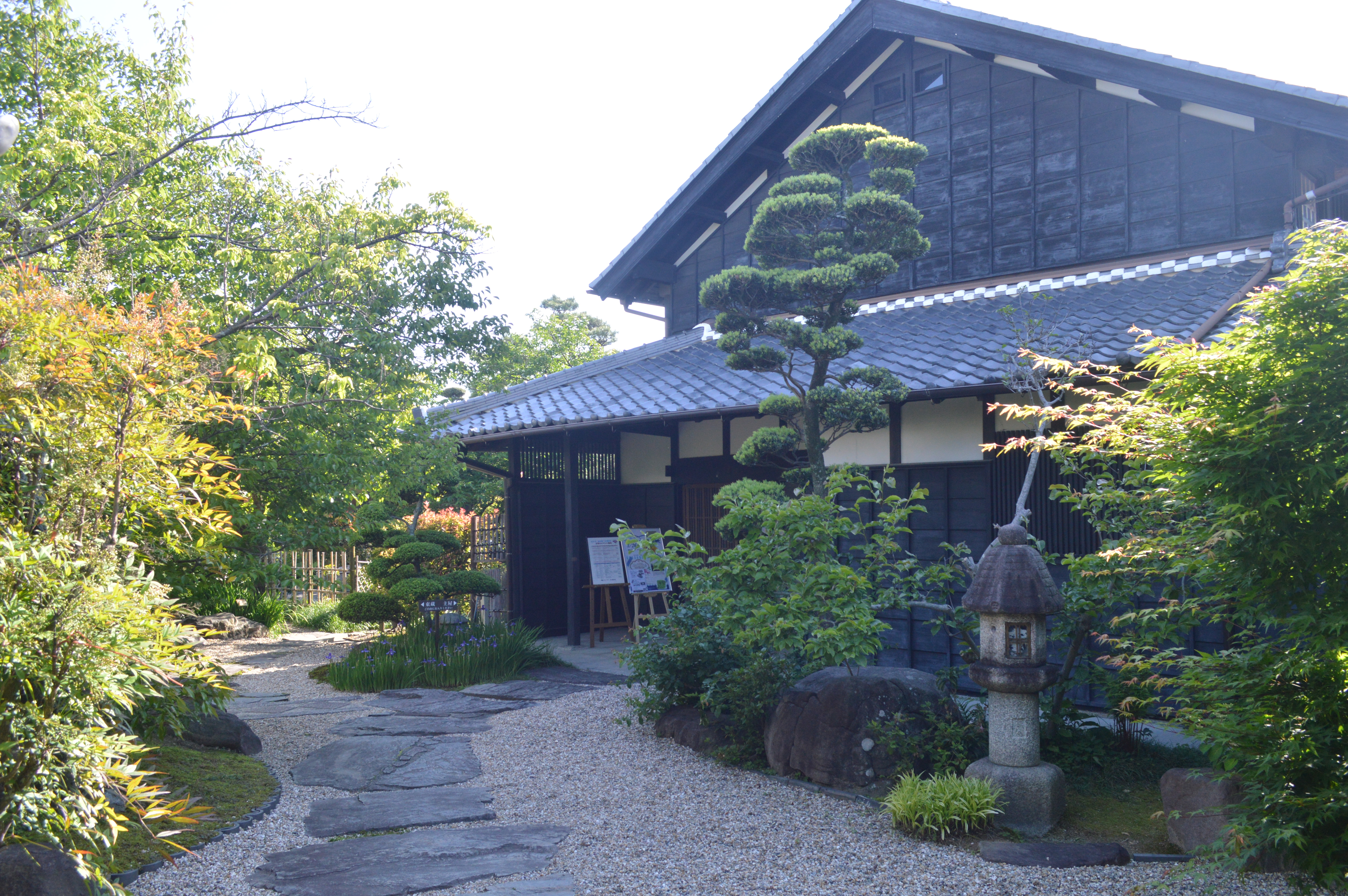 愛知県みよし市にある石川家住宅。主屋。みよし市指定有形文化財。